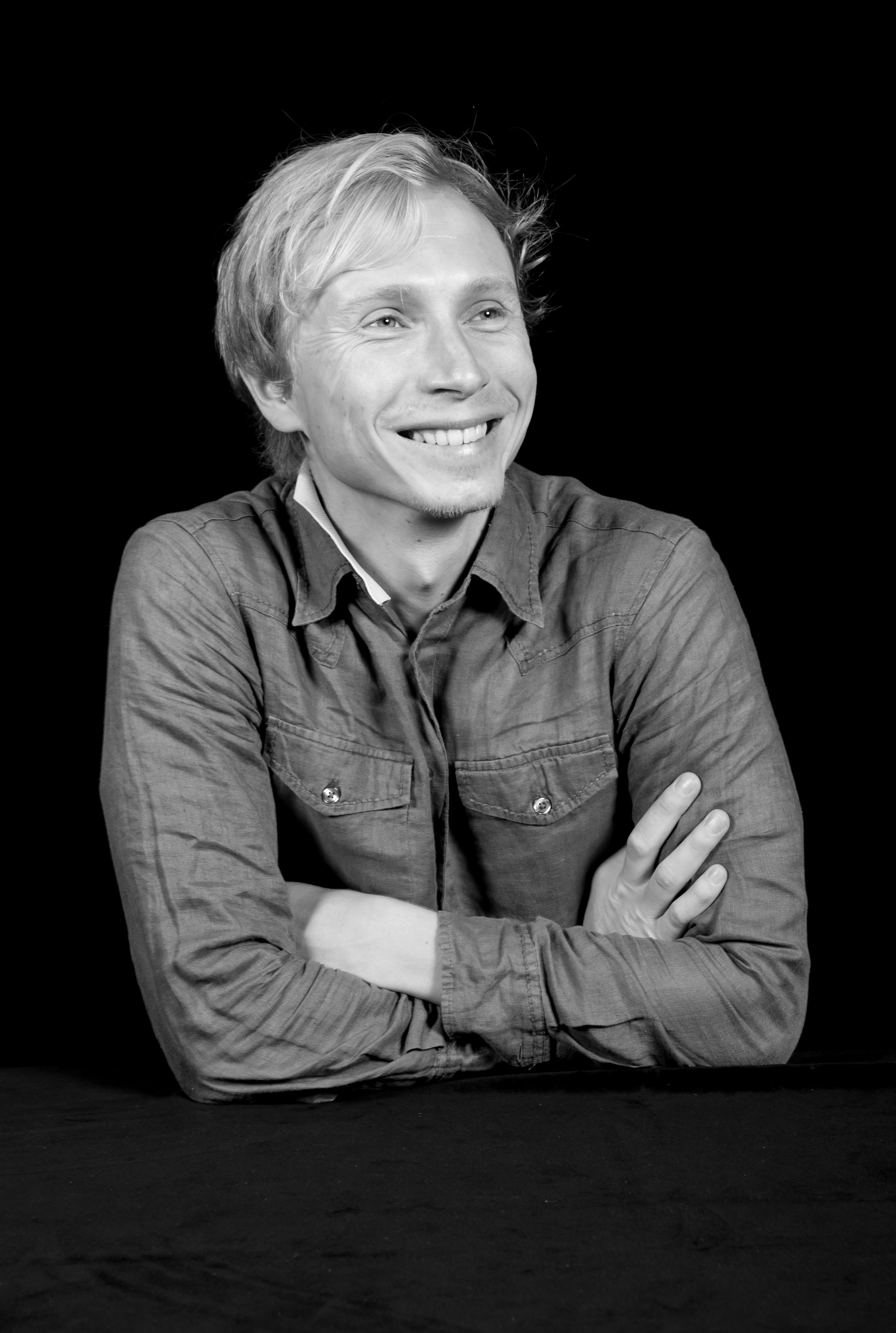 Mait Joorits III